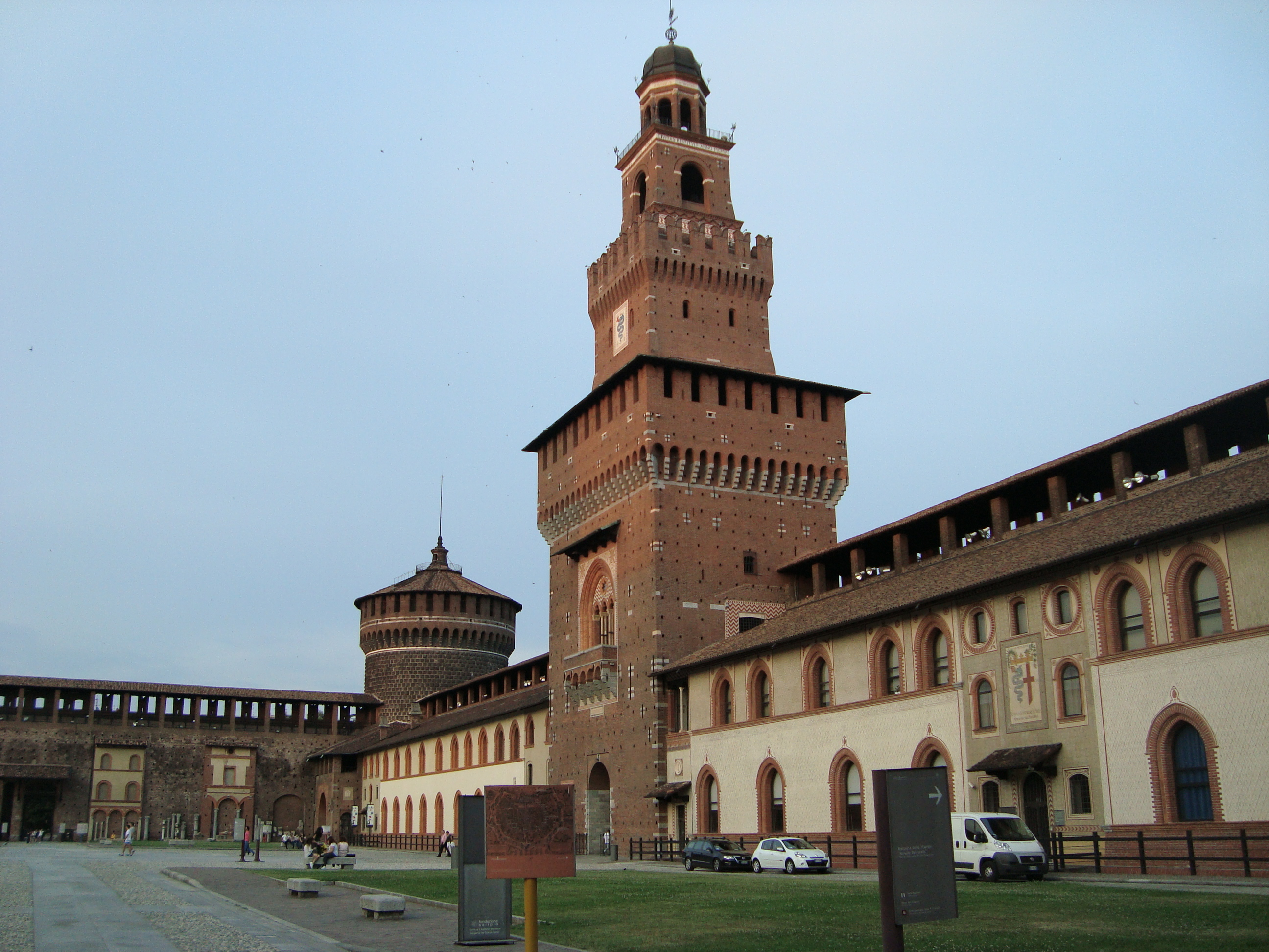 Milano